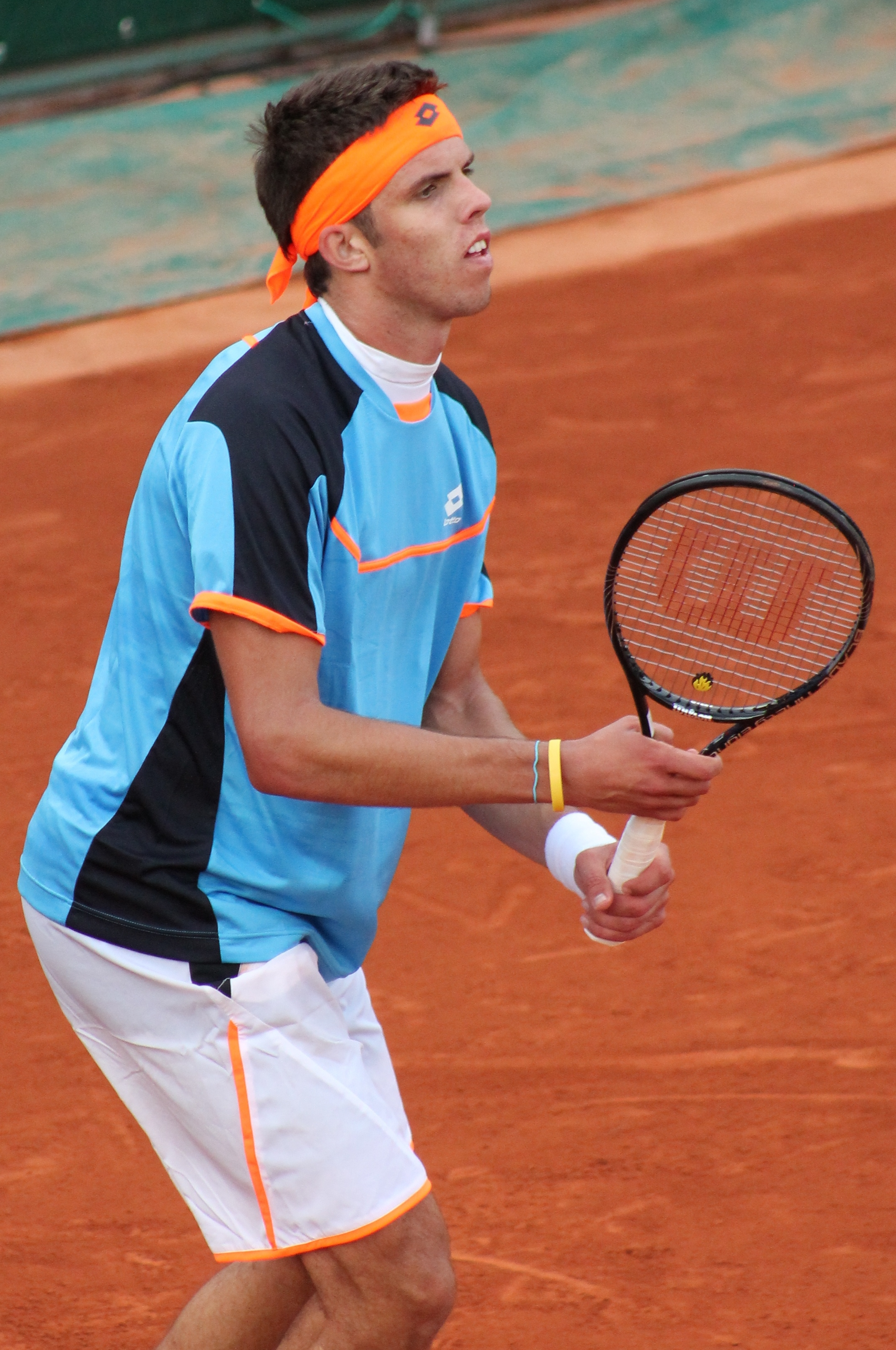 Vesely RG13 (13)